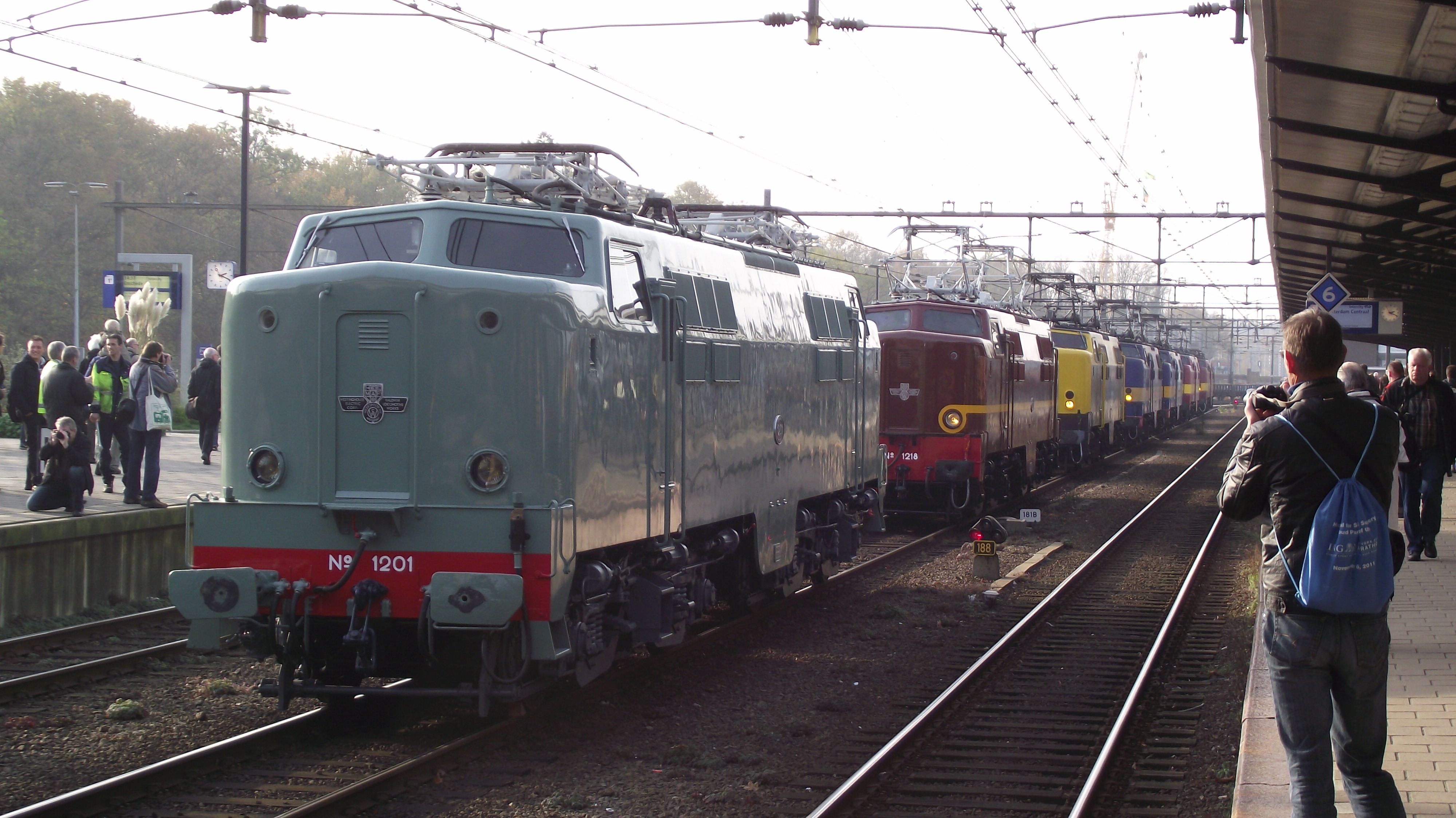 Een serie 1200 locs wordt opgesteld in Amersfoort ter gelegenheid van de 80 jarige jubileumviering van de NVBS. zie nl:1200 (elektrische locomotief)